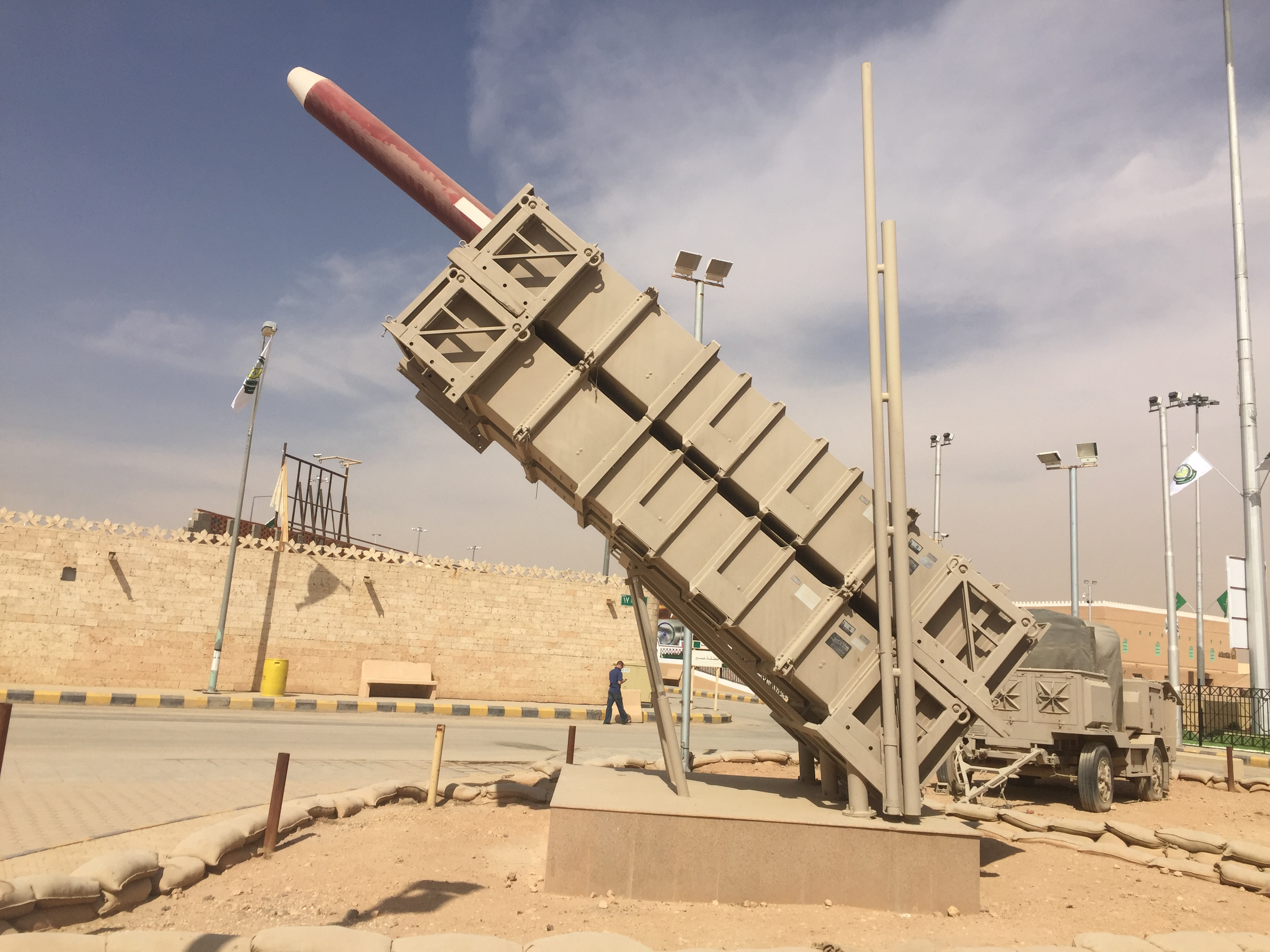 معرض القوات المسلحة السعودية في مهرجان الجنادرية.